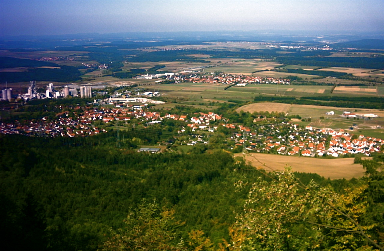 Dotternhausen vom Plettenberg gesehen. Links im Bild die Firma Holcim. Autor: Michael Meding